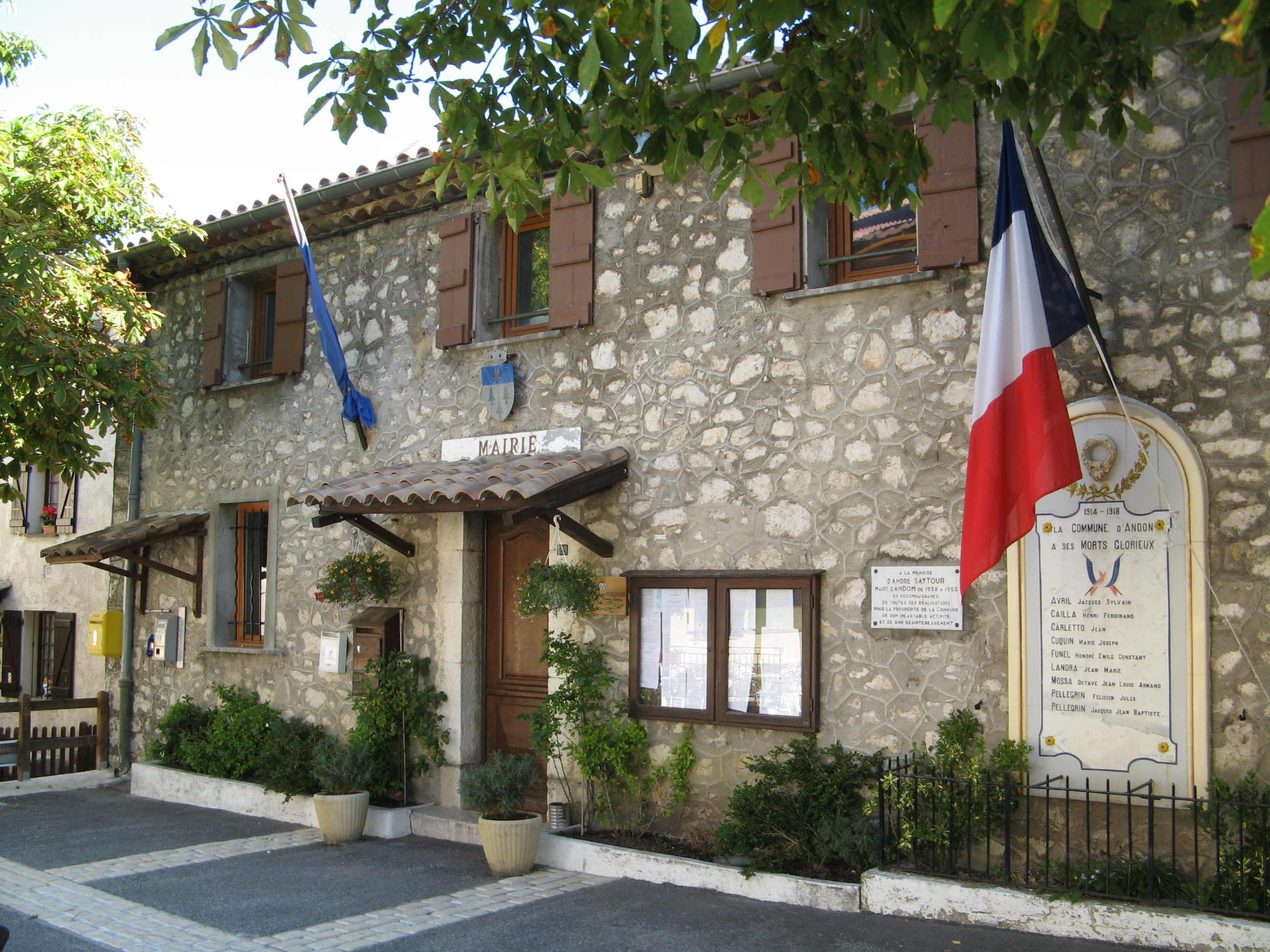 Mairie d'Andon (Alpes-Maritimes)